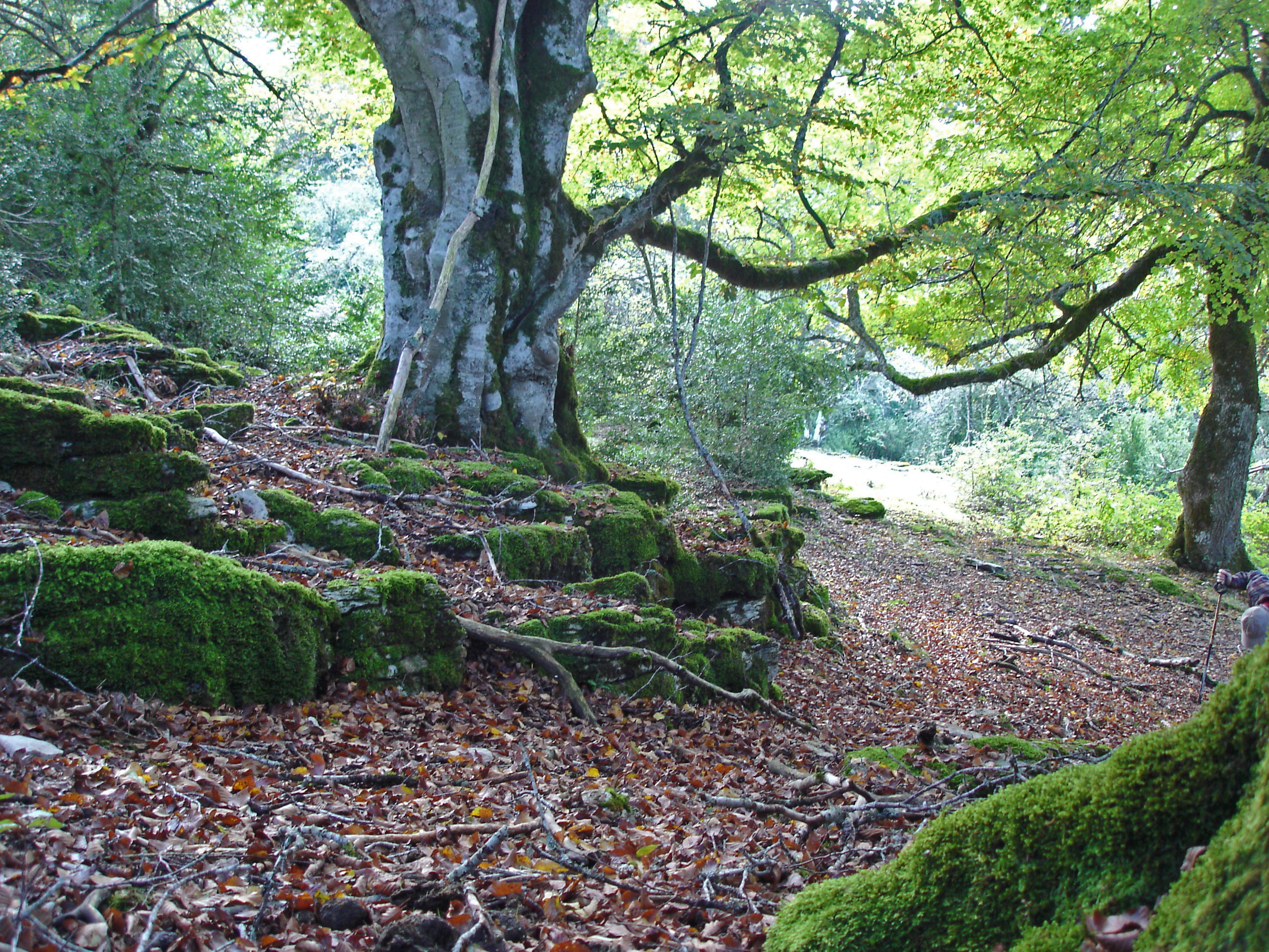 Urbasako basoa